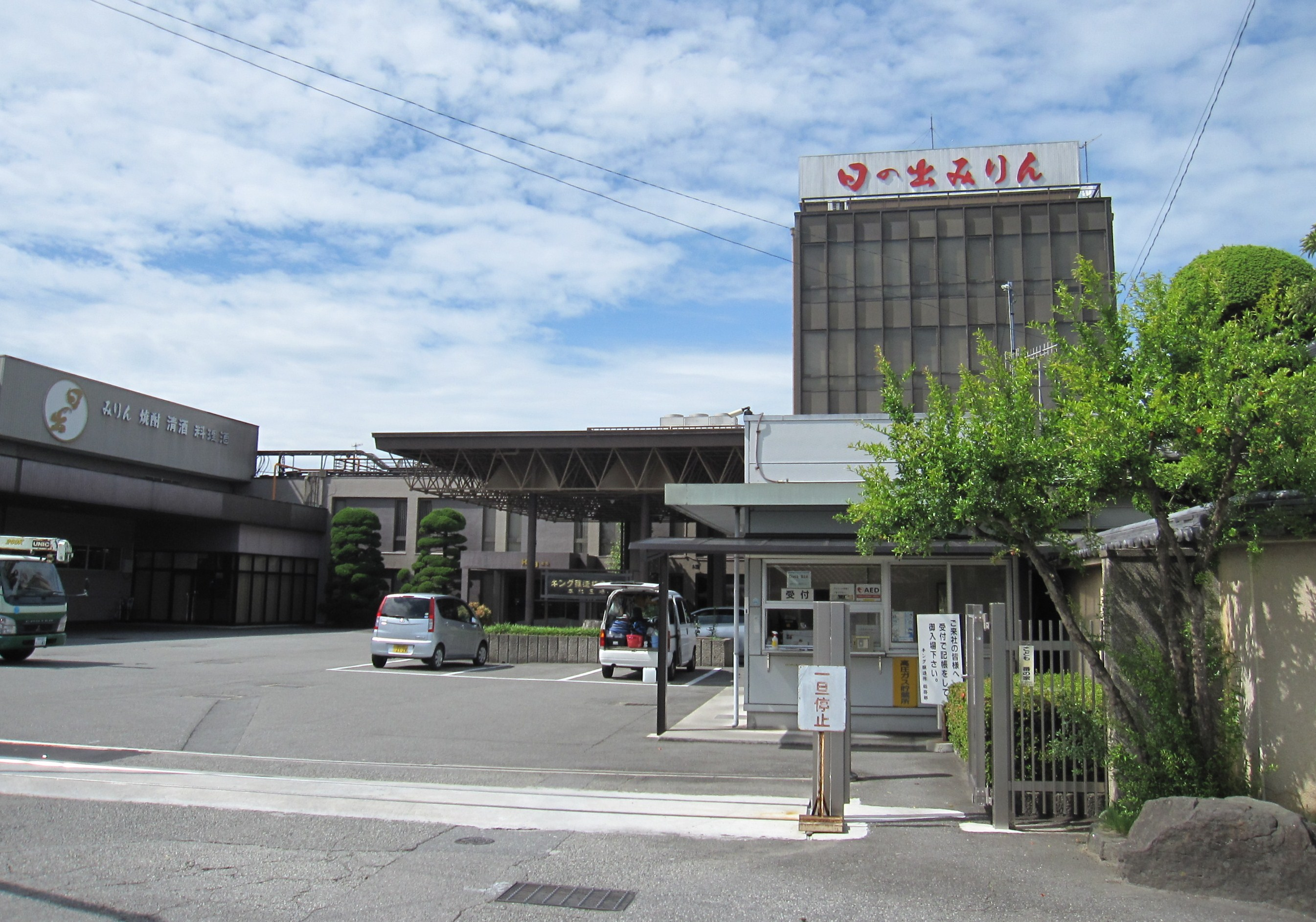 キング醸造本社工場